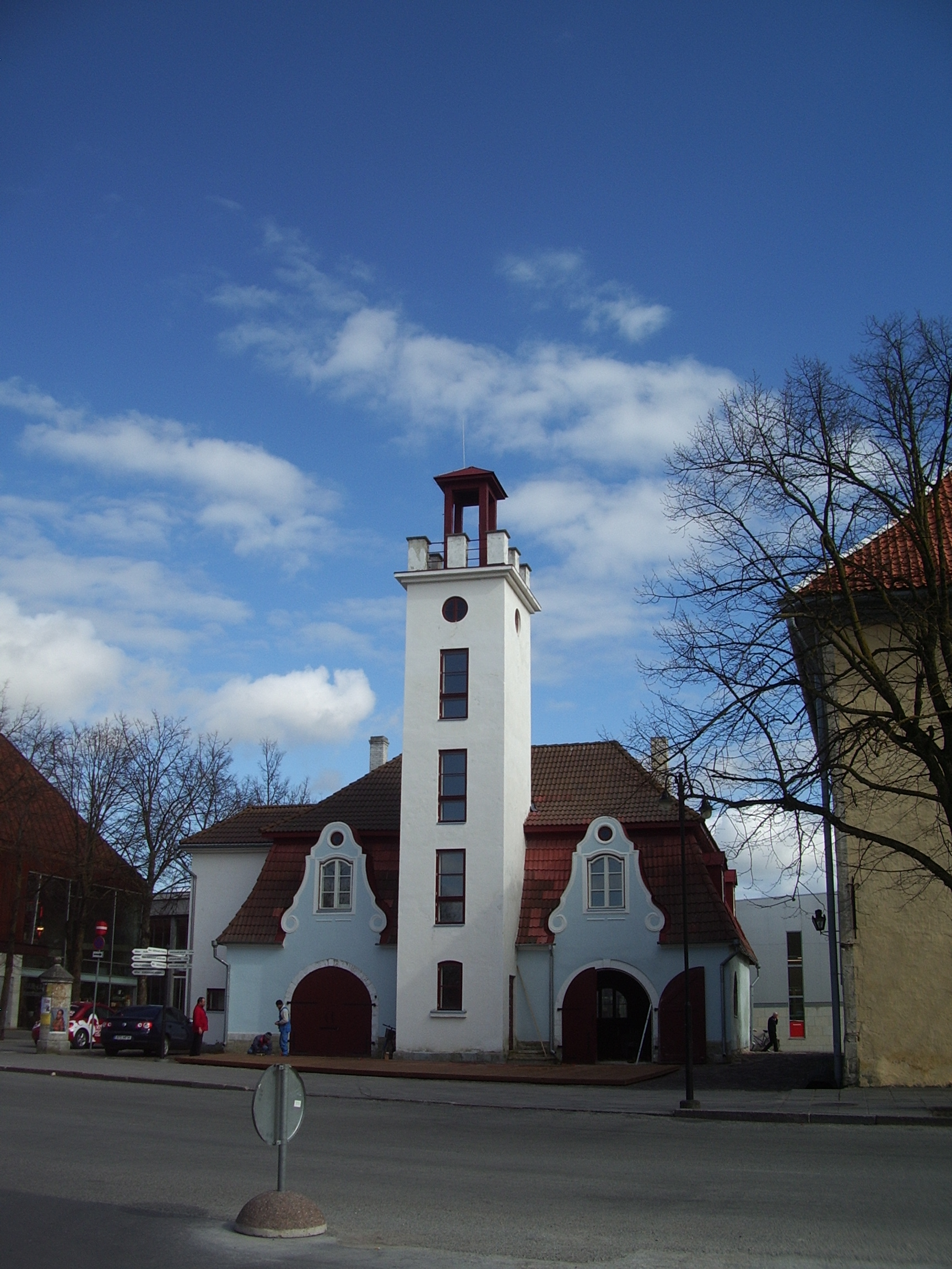 Tuletõrjetorn Kuressaare kesklinnas